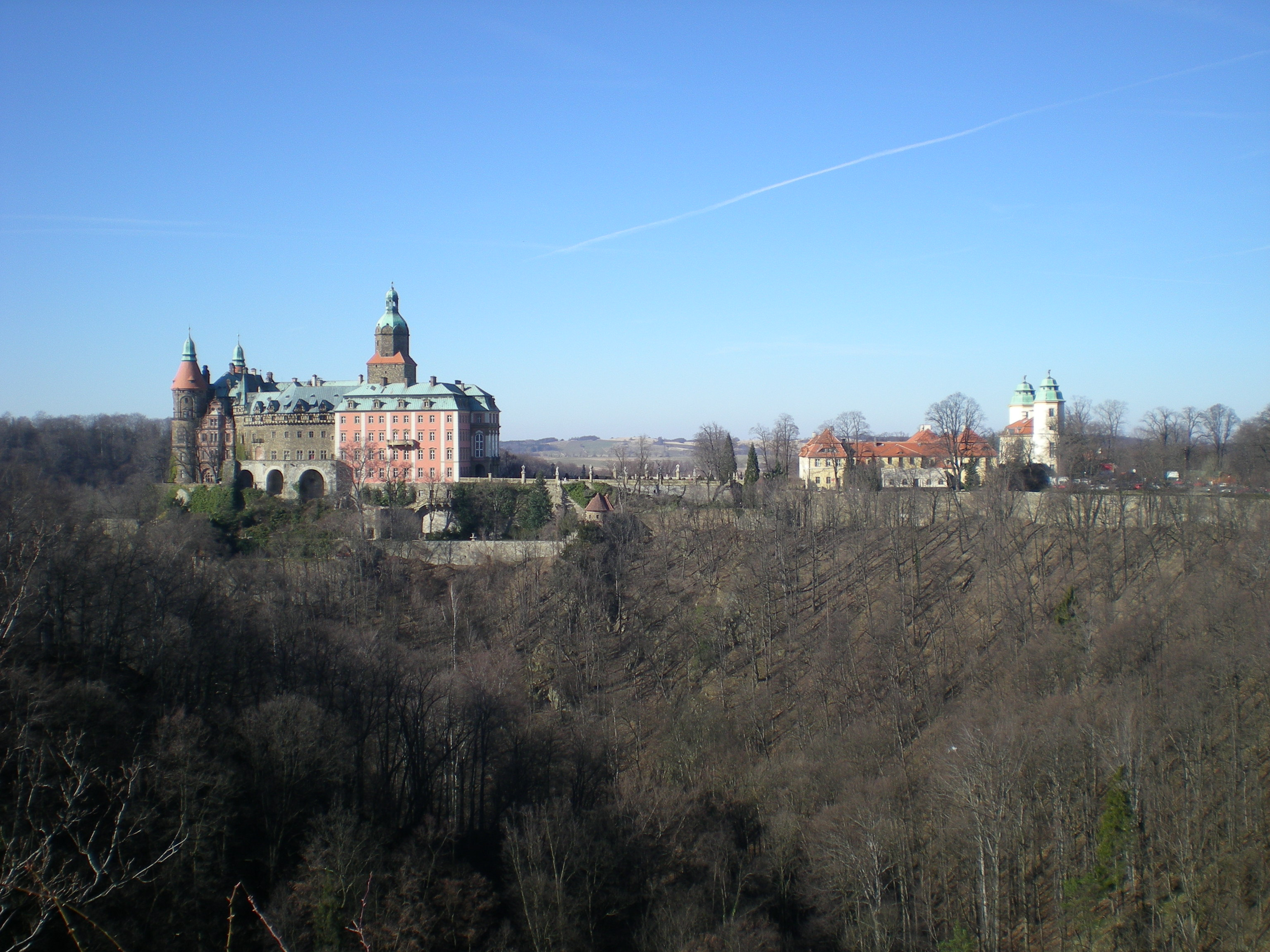 Zamek Książ